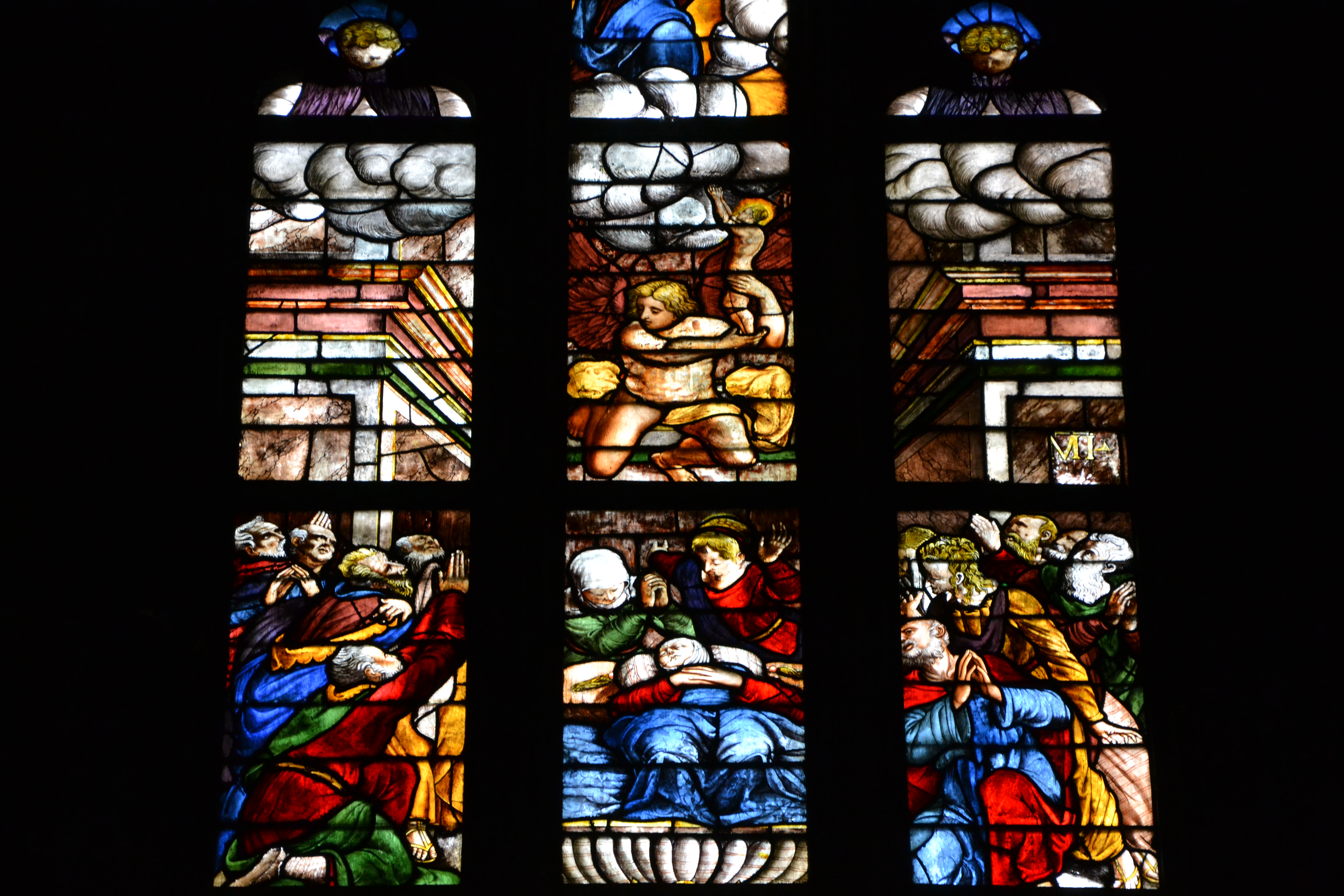 Milano, Duomo, vetrata cinquecentesca è dedicata alle Glorie della Vergine. Fu realizzata da Pietro Angelo Sesini e Corrado de' Mochis su cartoni di Giovanni da Monte.